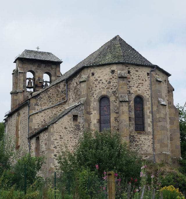 Eglise paroissiale Saint-Jean-Baptiste à Le Monteil (cantal 15240)